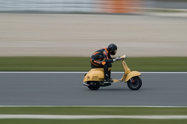 Vespa bei Rennveranstaltung